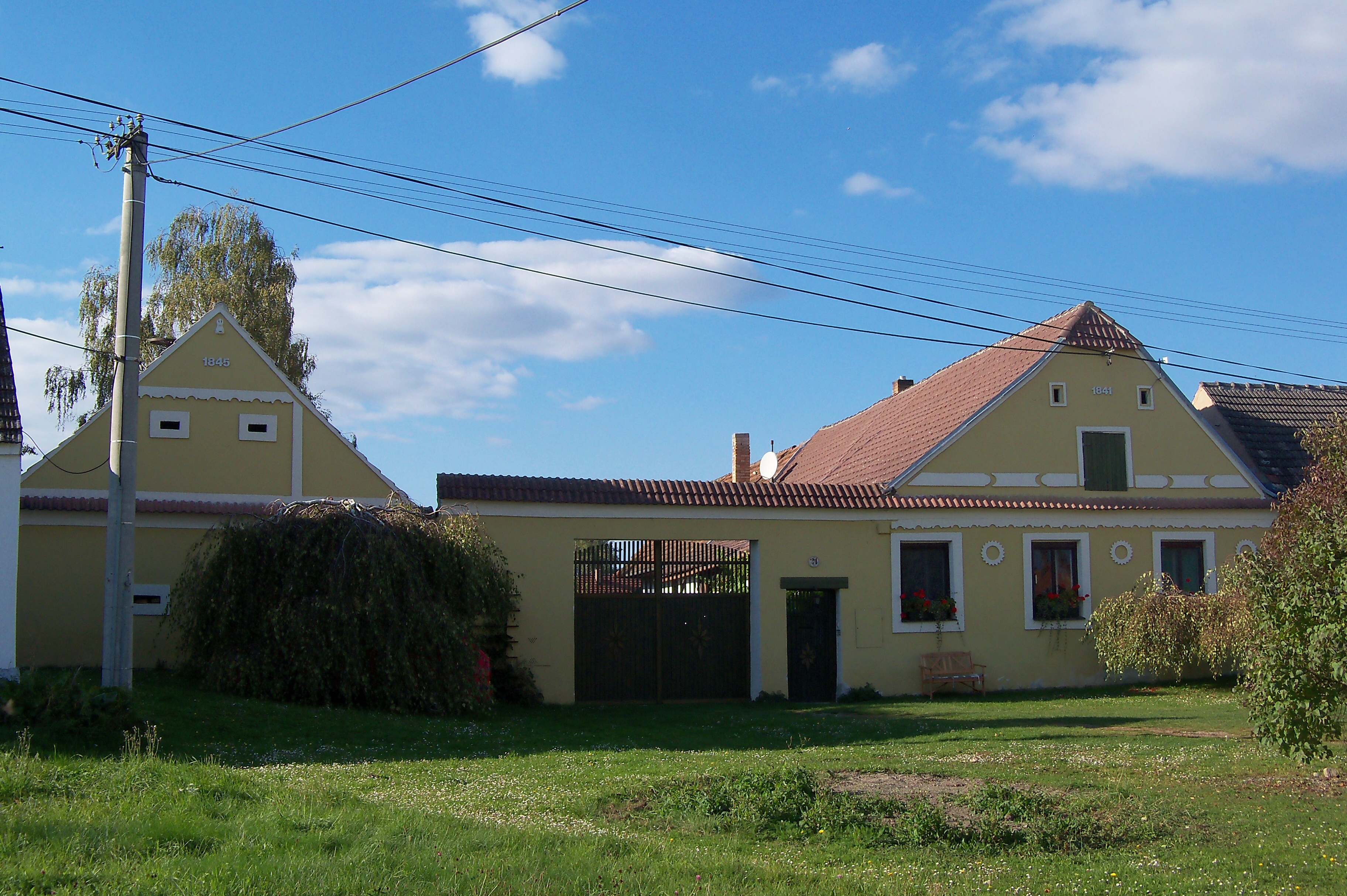 Venkovská usedlost (Horusice), Horusice 21